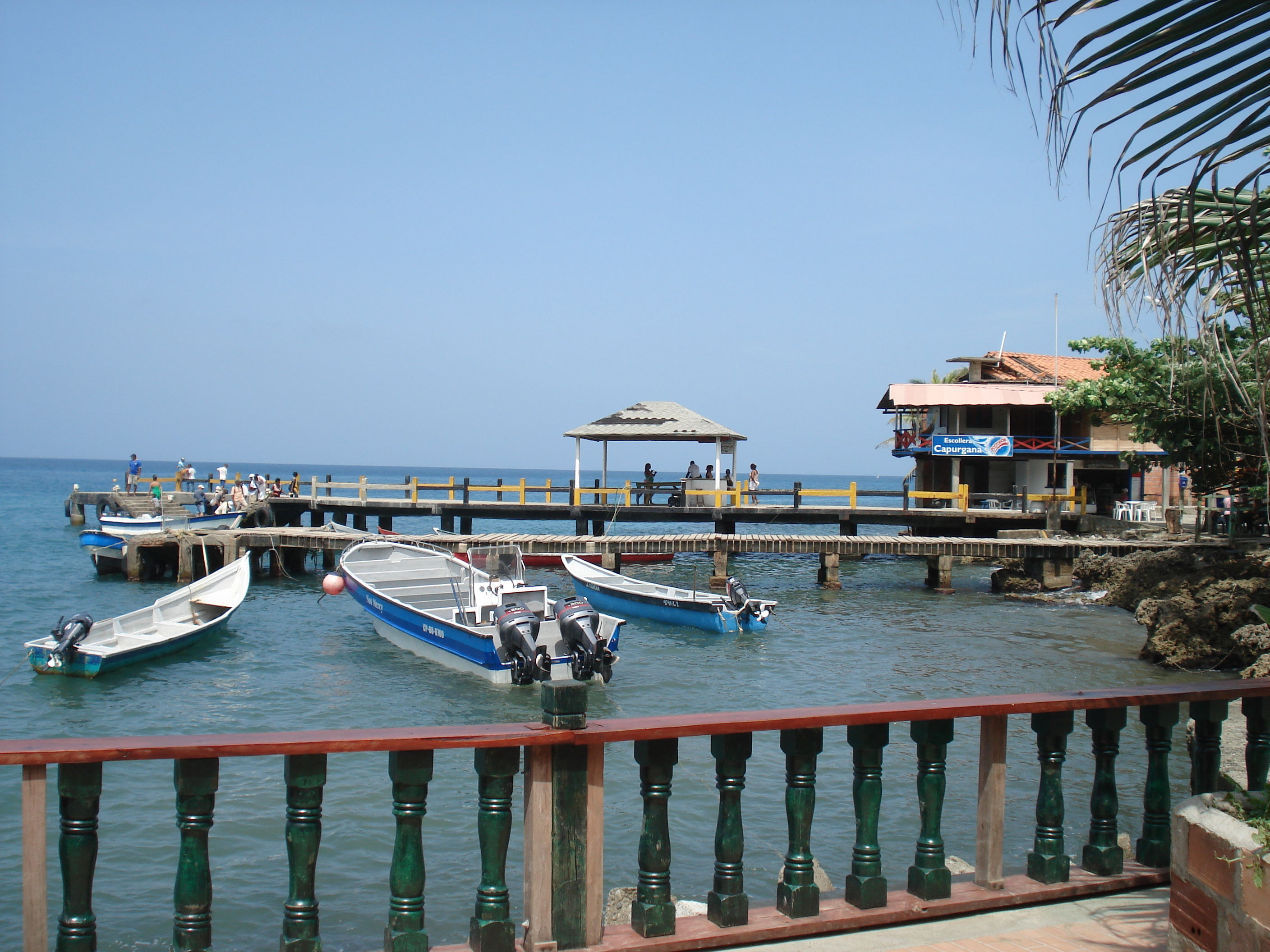 Capurganá